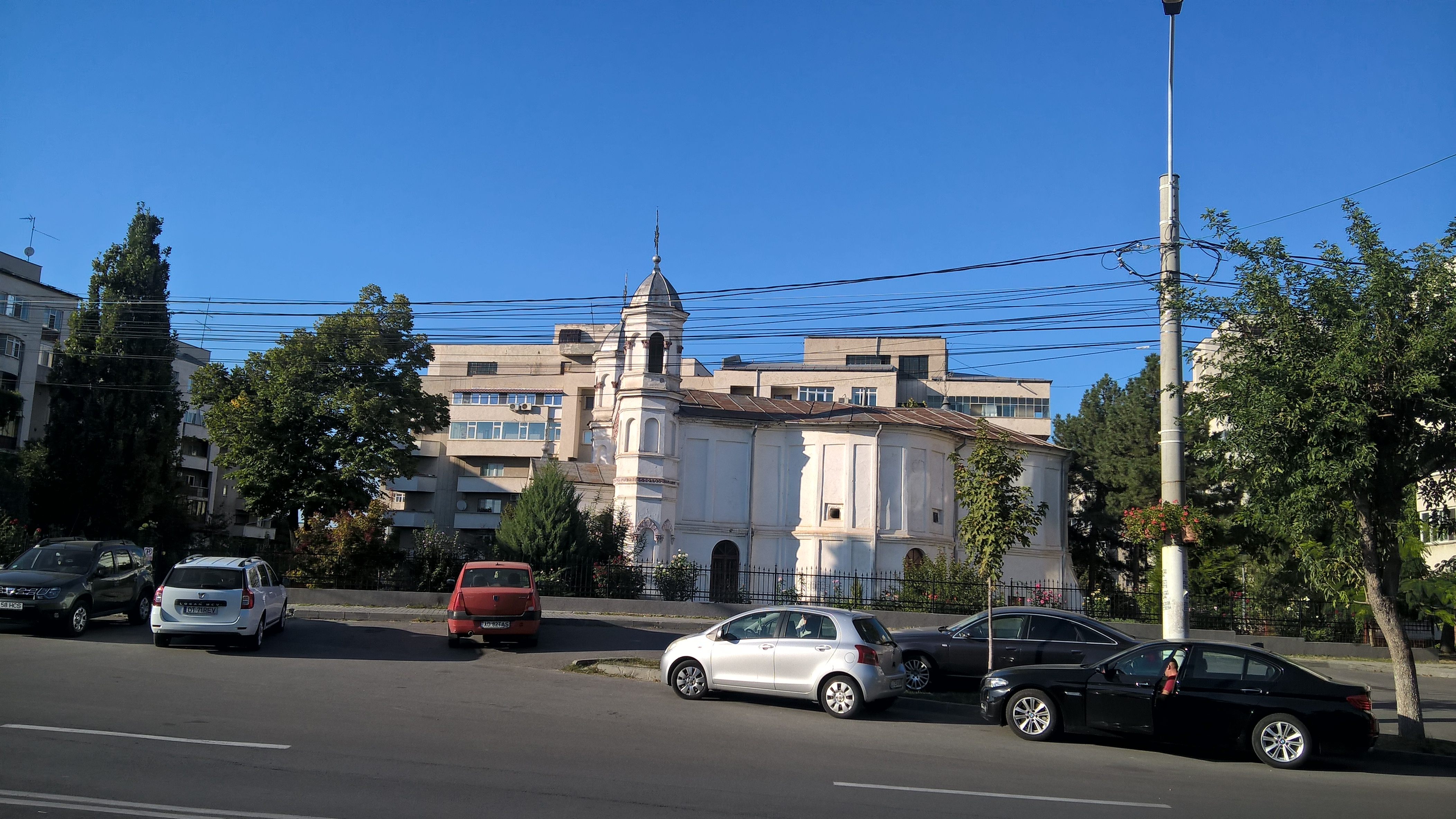 Turn clopotniță 02